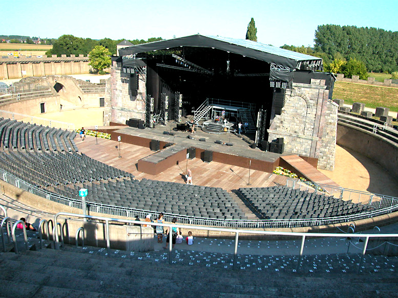 Archäologischer Park Xanten